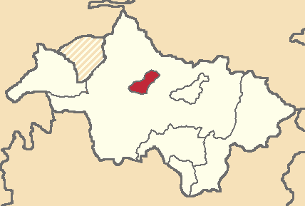 Mapa localizacor del cantón en Cañar, Ecuador